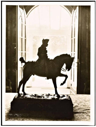 Das Reiterstandbild des 60-Jährigen Friedrichs des Großen von Christian Rauch in Haus Doorn. [1]